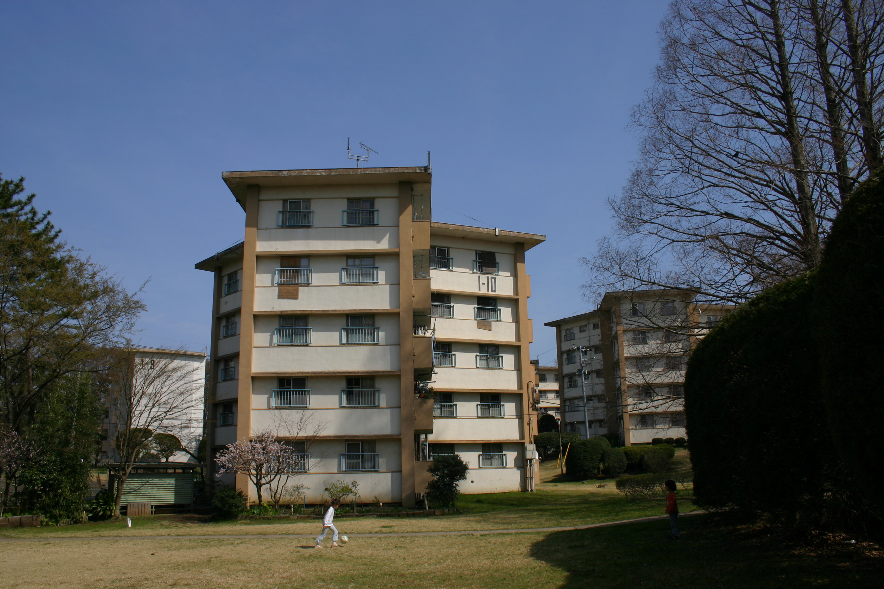 常盤平団地のスターハウス。日本住宅公団が建設したスターハウスの代表例。